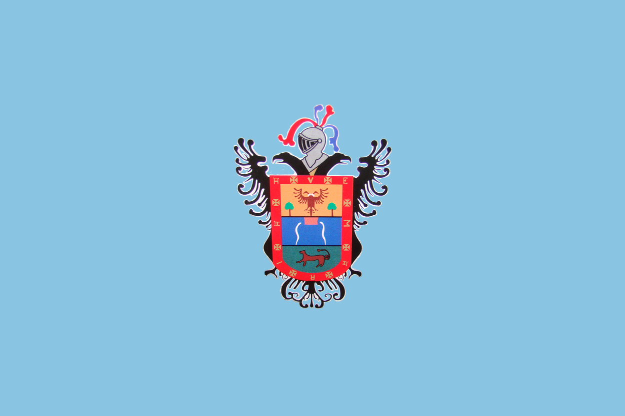 Bandera de la provincia de Urubamba, departamento del Cusco, Perú